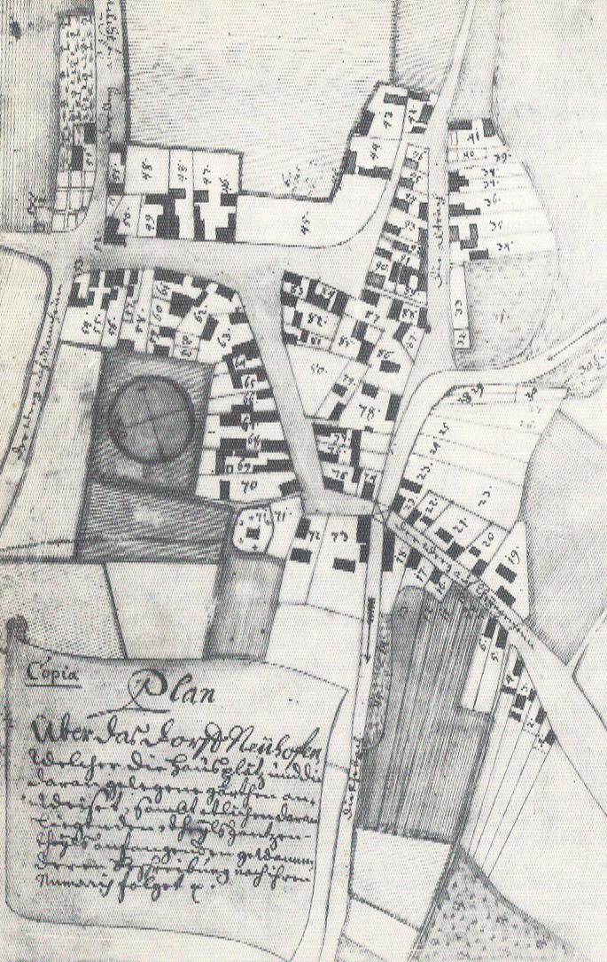 Straßenkarte von 1746, Germany Rhineland-Palatinate Rhein-Pfalz-Kreis Neuhofen (Pfalz) Süden ist auf dieser Karte oben und Norden unten. Zu sehen sind außer evangelischer Kirche und Rehbach die heutige Burggasse, Hauptstraße, Schafgasse (bezeichnet mit "... Mannheim"), Kirchgässel, Speyerer Straße, Medenheimer Straße, Ludwigshafener Straße (bezeichnet mit "... Rheingönheim") und Rehhütter Straße.